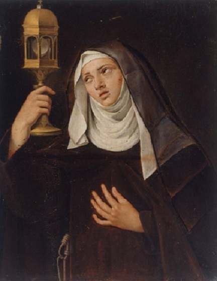 "Santa Chiara", olio su tavola, 52 x 65 cm, Pinacoteca comunale di Forlì